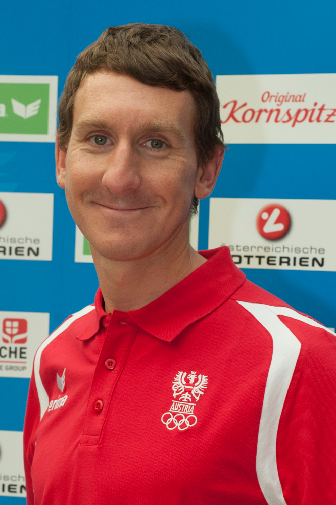 Einkleidung der Österreichischen Teilnehmer an den Olympischen Sommerspielen 2016 am 16./17. Juli 2016 in Wien. Bild zeigt Thomas Springer.